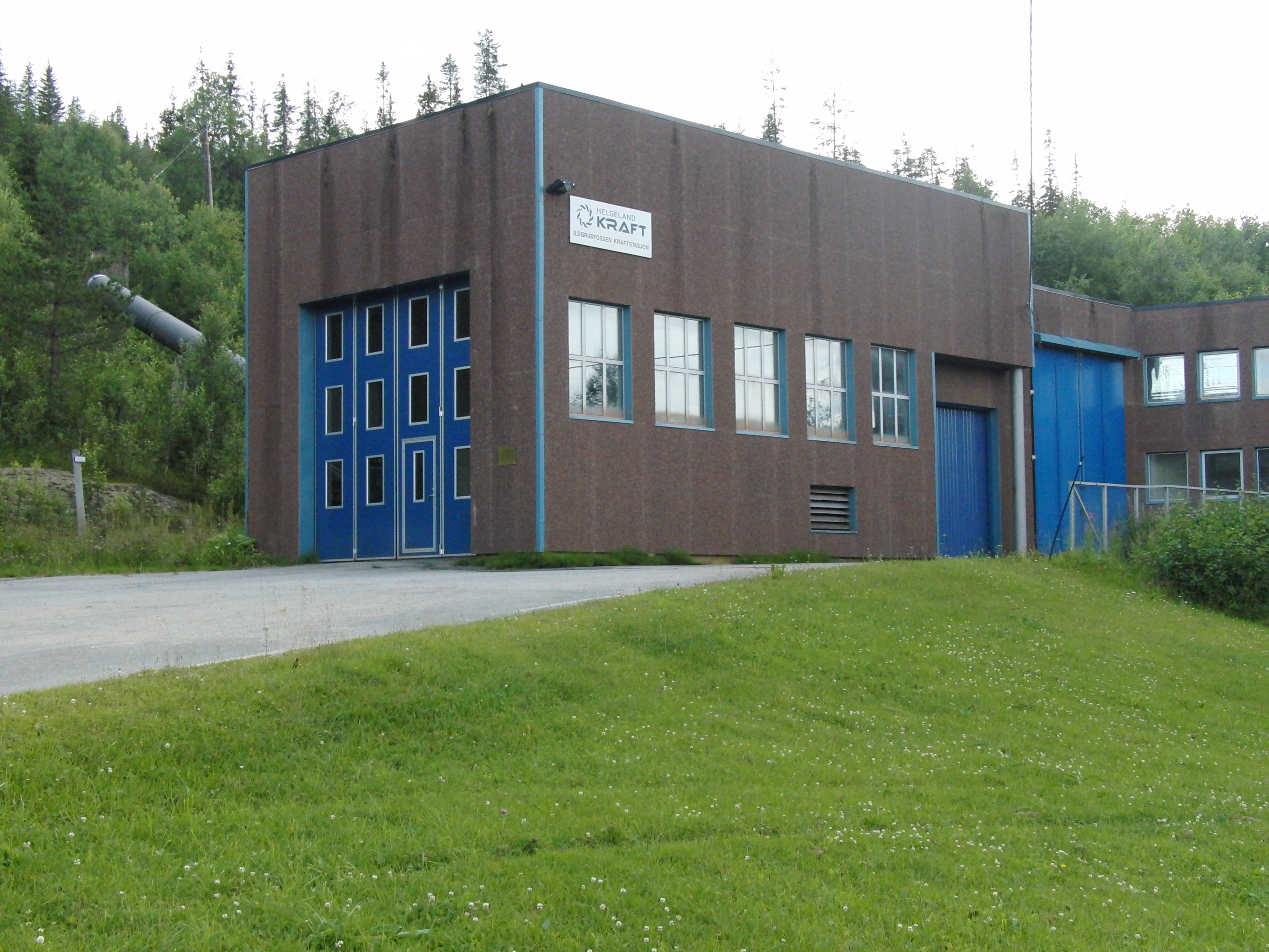 Ildgrubfossen kraftverk